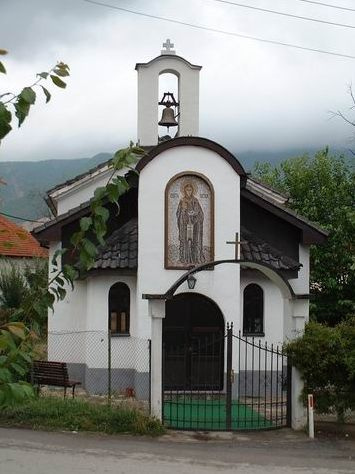 Црквара Света Петка во Гостивар